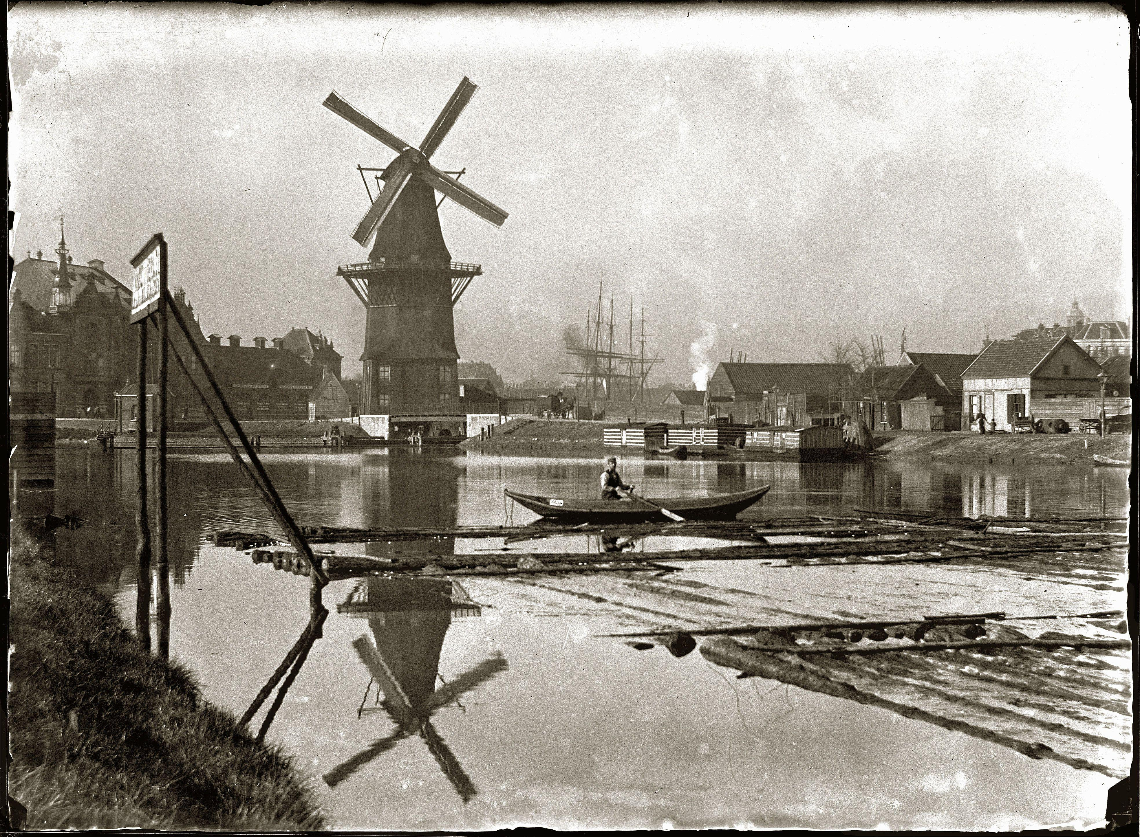 Beschrijving Lozingskanaal Gezien naar korenmolen De Gooyer (Funenkade 5). Links de gereformeerde Funenkerk (Zeeburgerstraat 14-16) en rechts het Zeeburgerpad. Documenttype foto Vervaardiger Olie``, Jacob (1834-1905) Collectie Collectie Jacob Olie Jbz. Datering 1 november 1896 Geografische naam Zeeburgerstraat Lozingskanaal Inventarissen Afbeeldingsbestand 10019A000495 Generated with Dememorixer